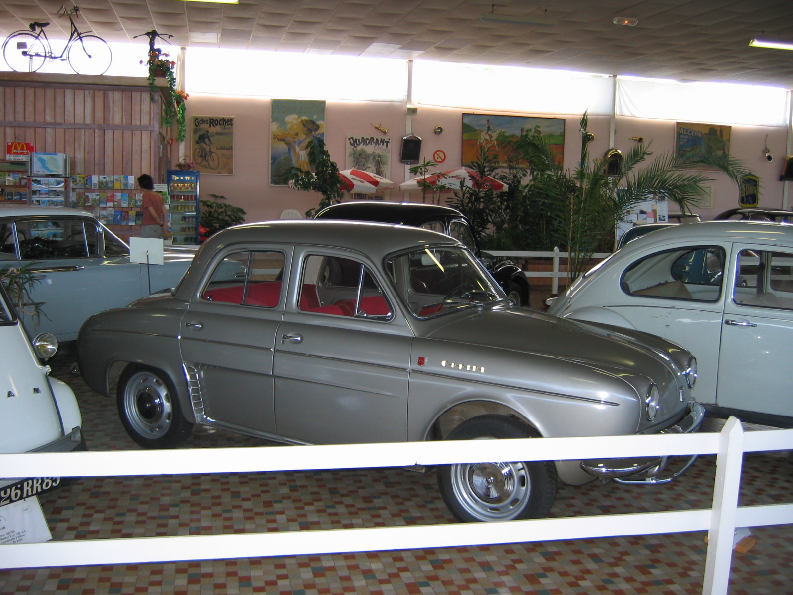 Renault Ondine Picture : Gérard Delafond Musée automobile de Vendée